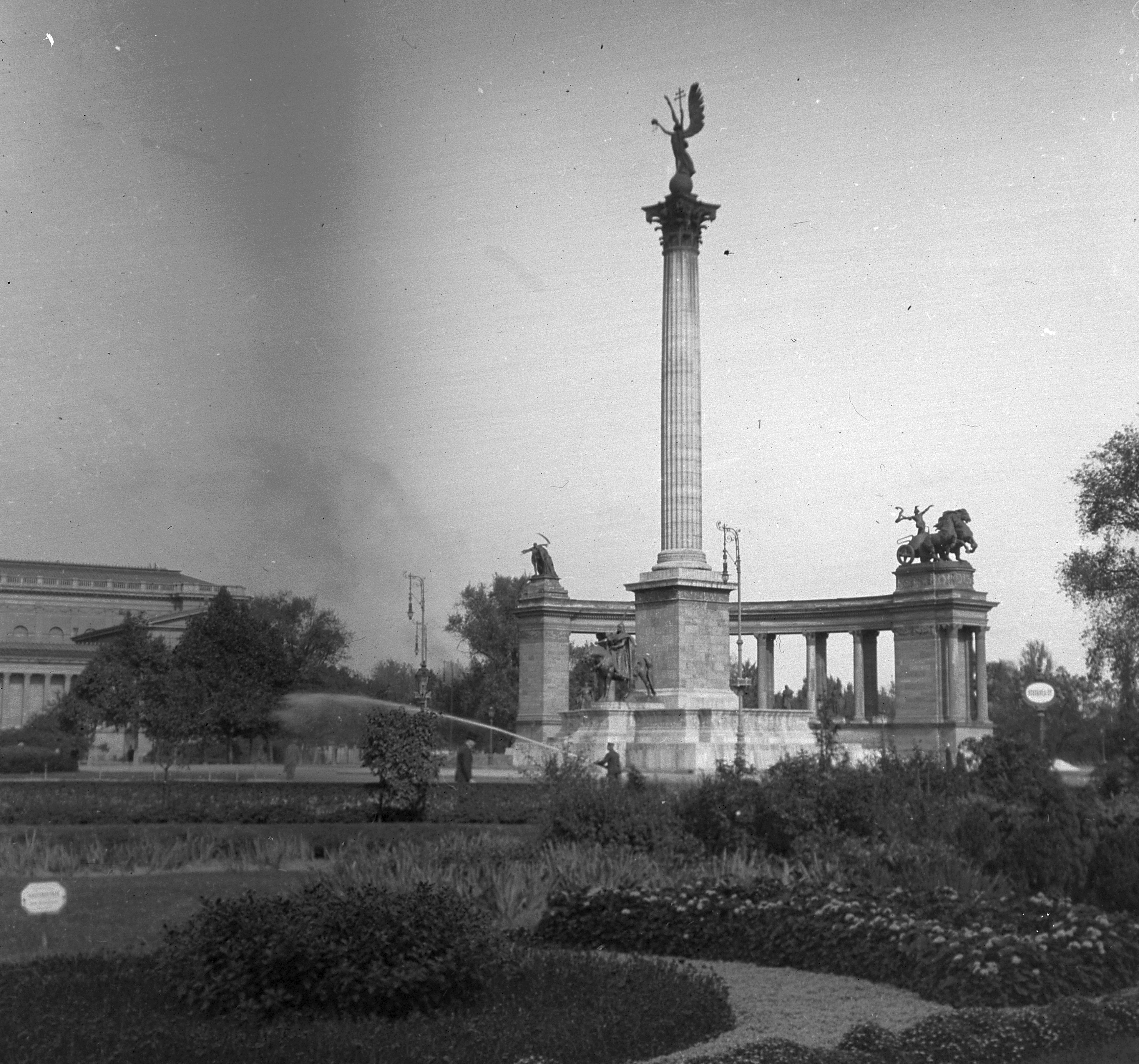 Millenniumi emlékmű a későbbi Hősök terén. Location: Hungary, Budapest XIV. Tags: Budapest Title: Millenniumi emlékmű a későbbi Hősök terén.